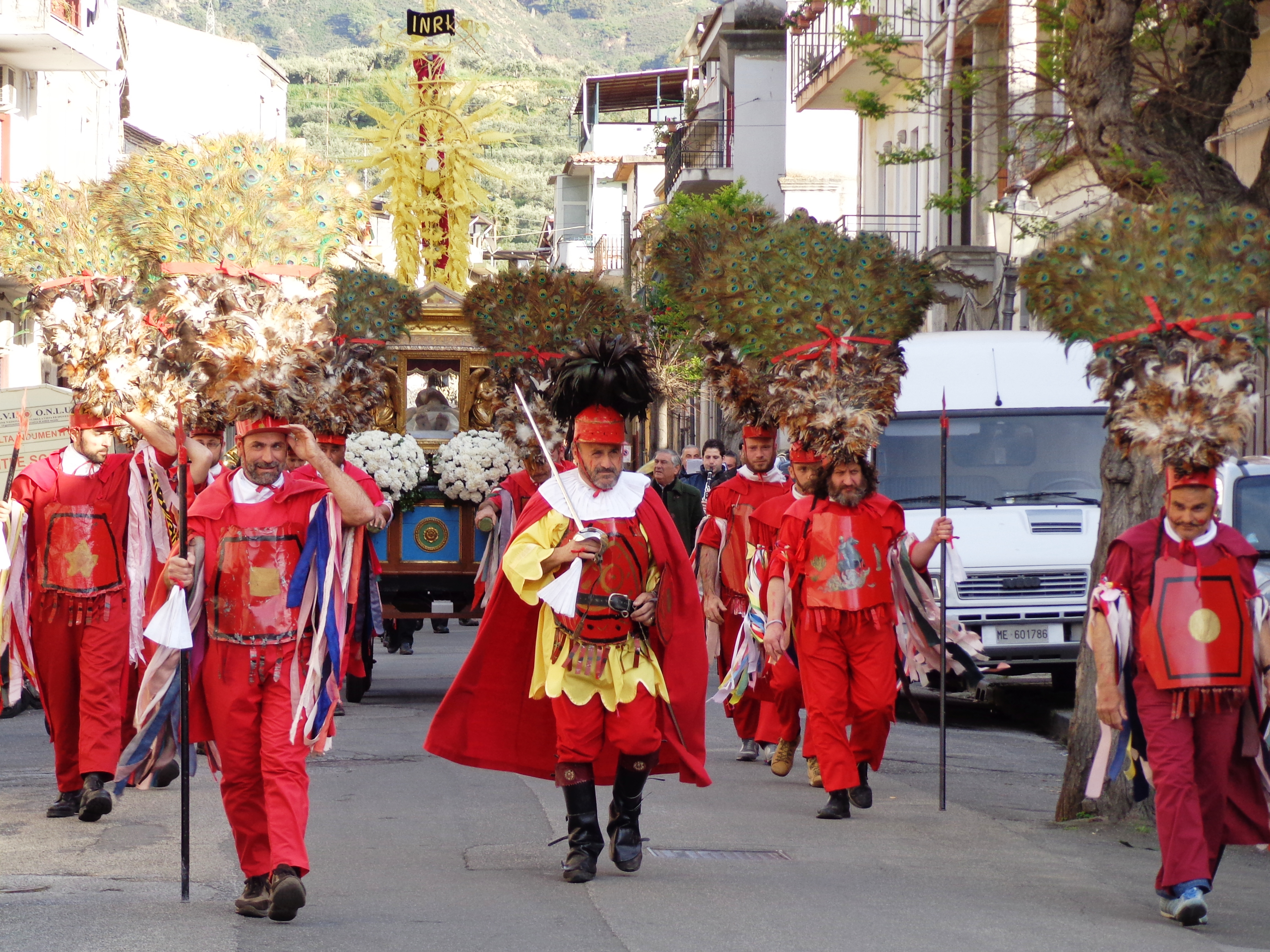 Giudei Pozzo di Gotto